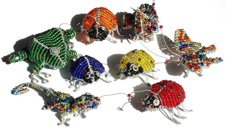 Beadwork als beispiel der Glasperlenverarbeitung